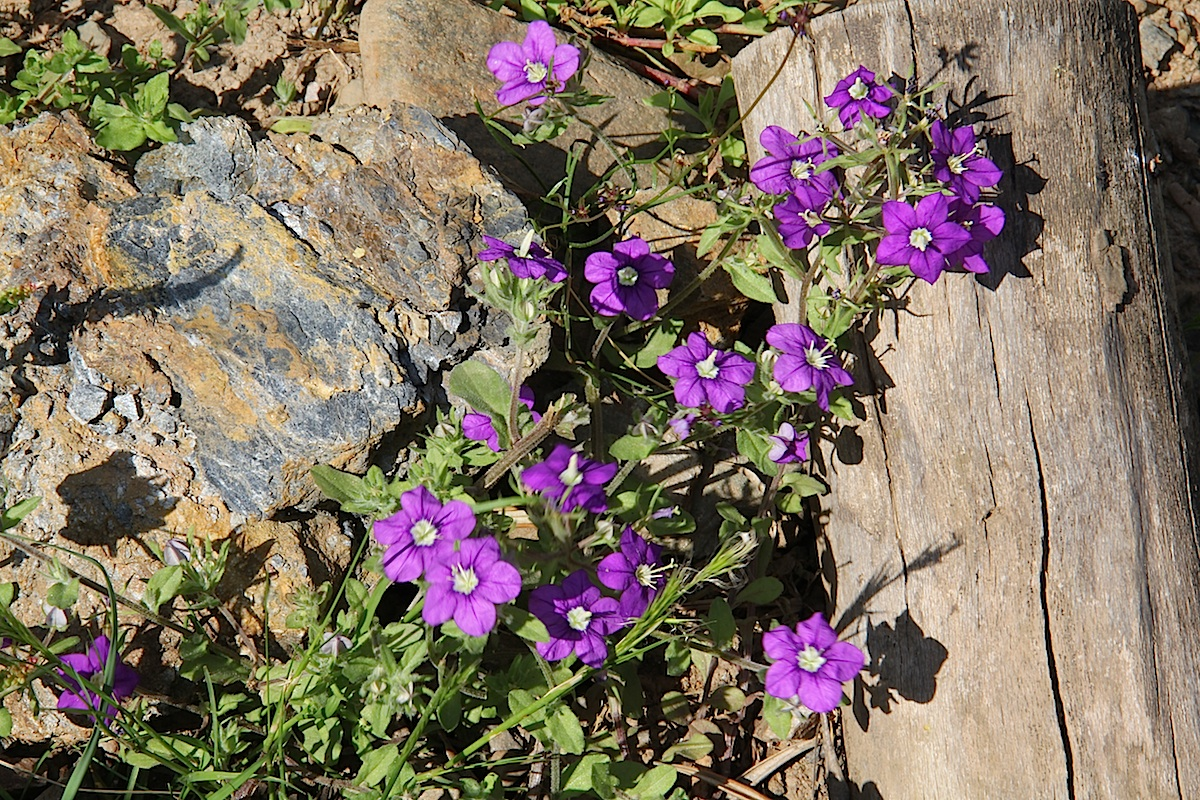 Legousia speculum-veneris (det. user:RLJ)